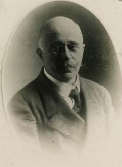 Gaetano Magnanini (Mirandola, 1866 – Modena, 14 gennaio 1950) è stato un chimico italiano. Allievo di Stanislao Cannizzaro all'Università di Roma, appena laureato nel 1887 venne nominato fin da subito da Giacomo Luigi Ciamician come suo primo preparatore all'Istituto chimico di Padova. Dopo essersi perfezionato a Lipsia per un anno, fu poi nominato professore di chimica all'Università di Messina dal 1890 al 1892. In seguito insegnò chimica generale per quarant’anni all'Università di Modena. Personalità complessa "piena di entusiasmi e di rinunce" e con un'intelligenza vivacissima, pubblicò importanti studi di spettrofotometria, che portarono alla scoperta che l'assorbimento delle soluzioni saline è indipendente dalla dissociazione dei sali presenti in soluzione. Nel 1894 inventò un piccolo motore a scoppio di benzina, pesante 8 kg, da installare su una "bicicletta a movimento automatico". Il progetto venne poi perfezionato da Pompeo Golinelli di Villafranca di Medolla: nacque così l'"Excelsior", il primo ciclomotore costruito a Modena.